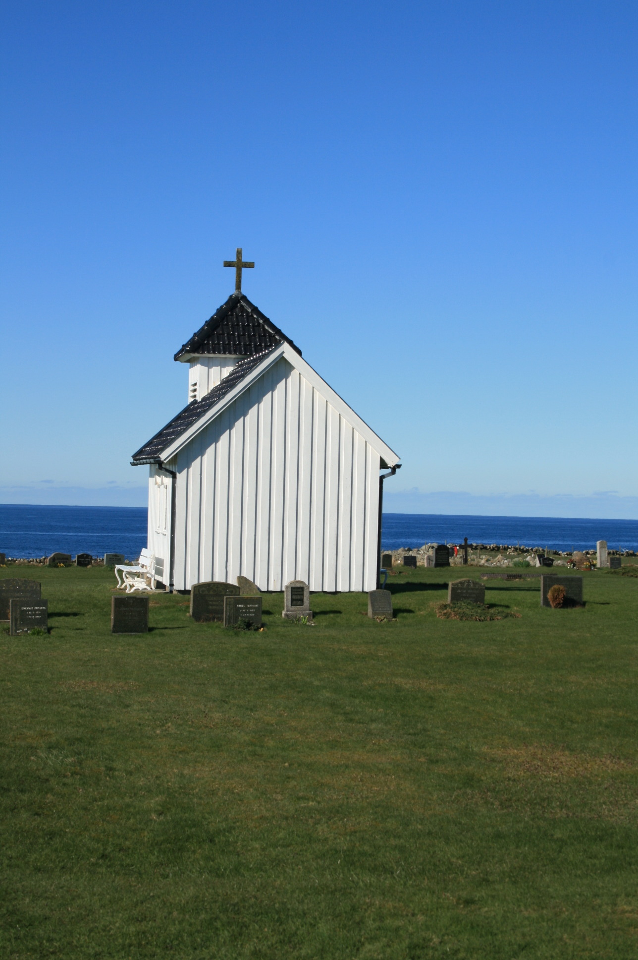 Bilde av kirken og noe av området rundt på Varhaug gamle kirkegård